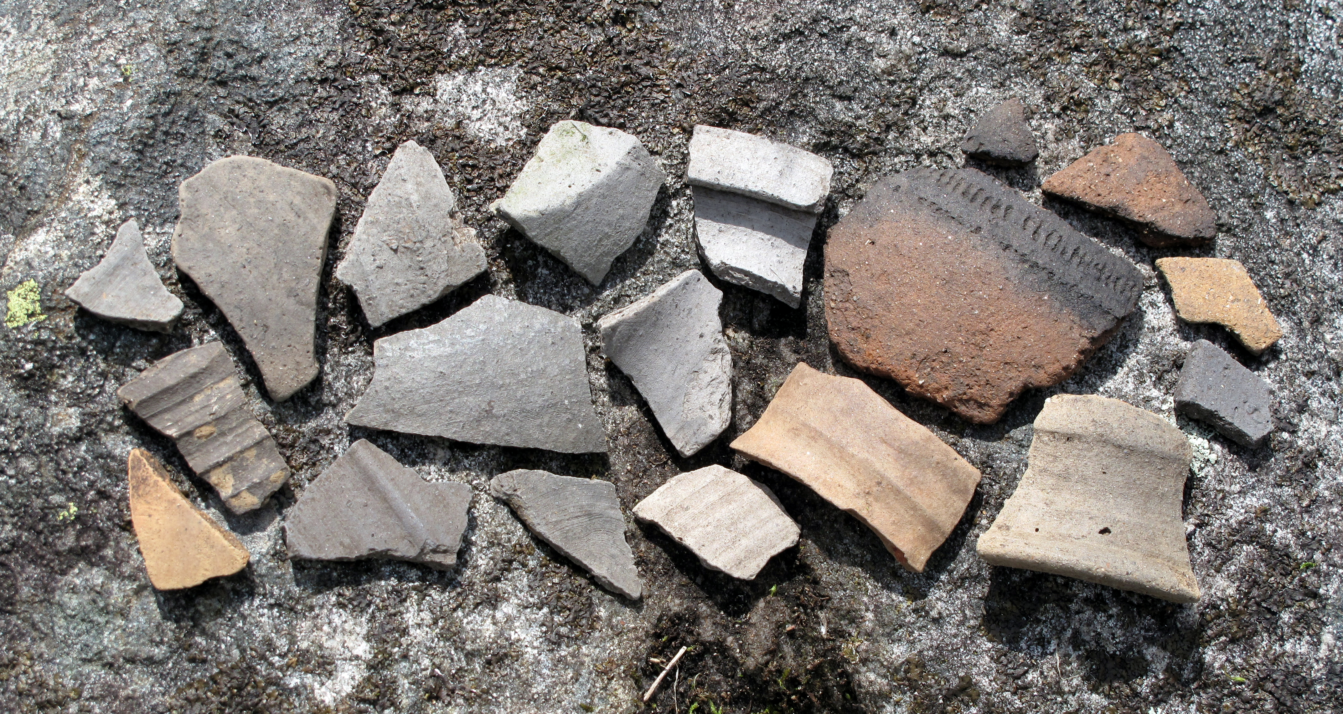 Lesekeramik.